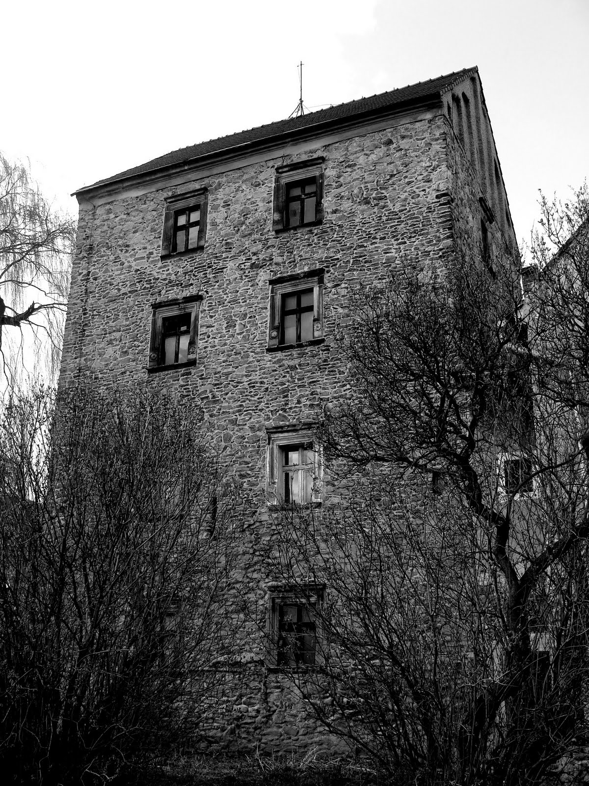 Pastuchów, wieża mieszkalna w zespole dworskim